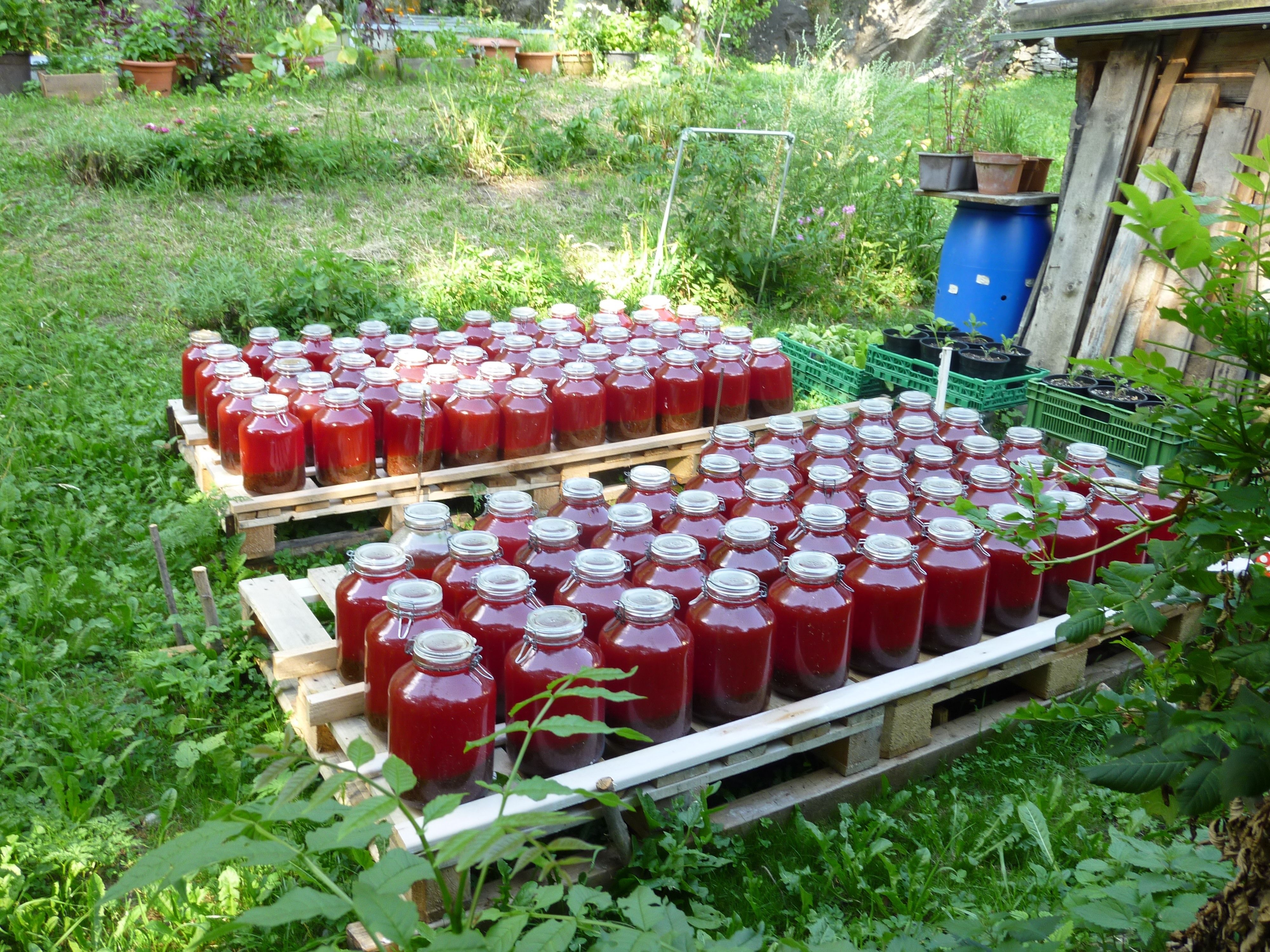 Produktion von Johannis-Öl in Soglio GR